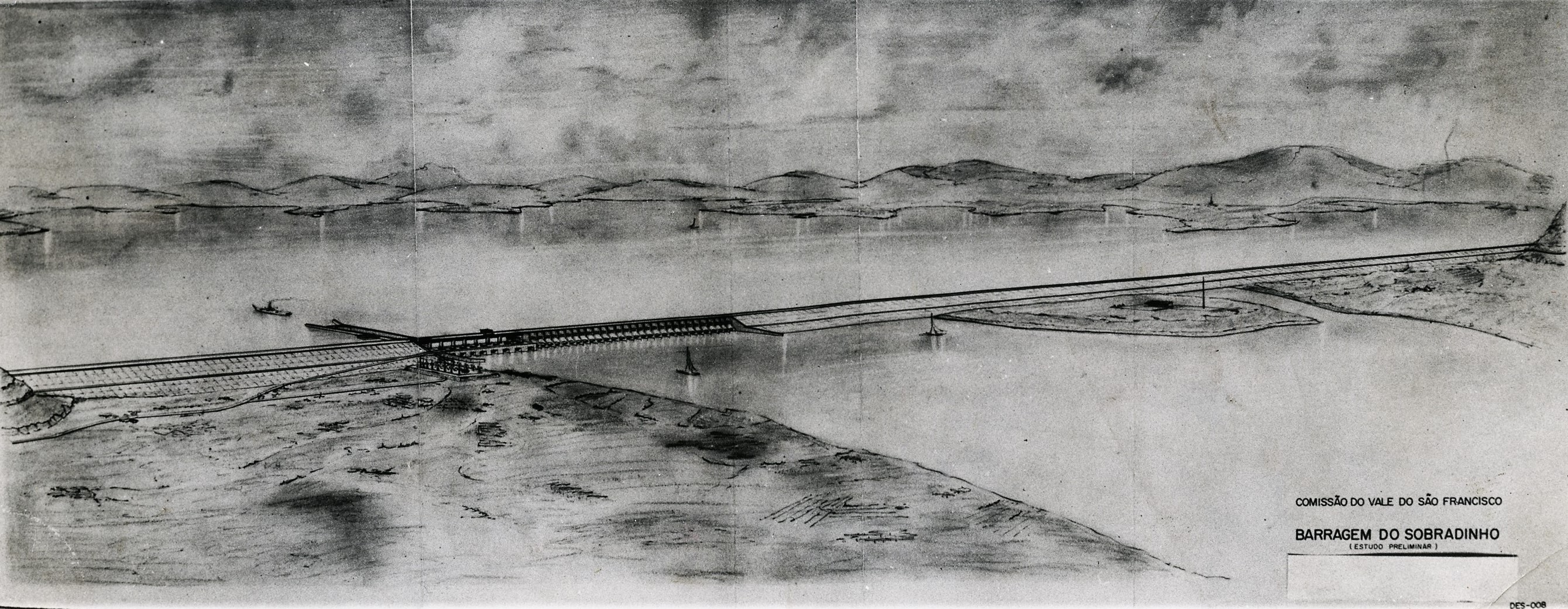 Fotografia do Fundo Correio da Manhã, sob a guarda do Arquivo Nacional.